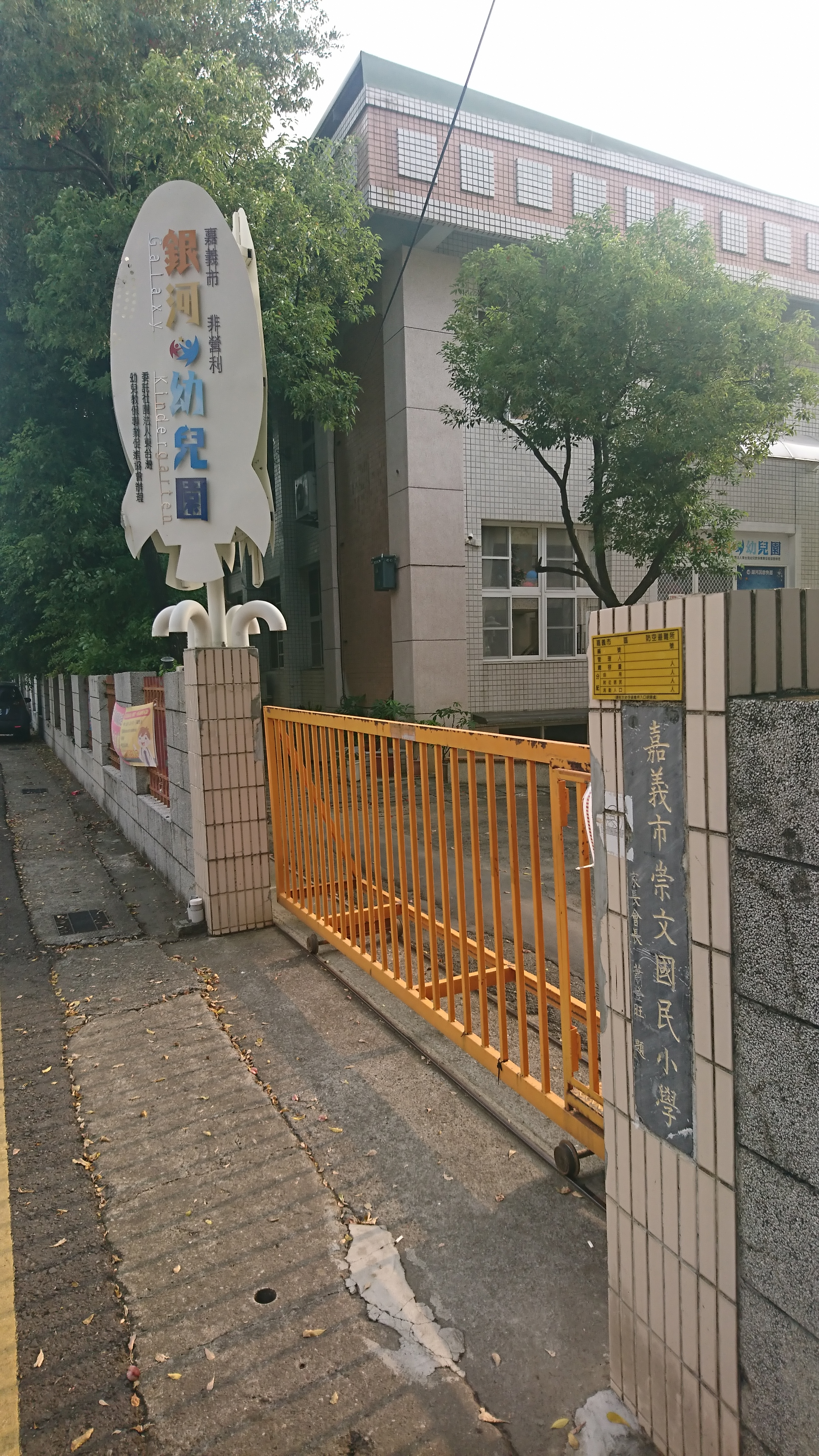 臺灣嘉義市銀河非營利幼兒園